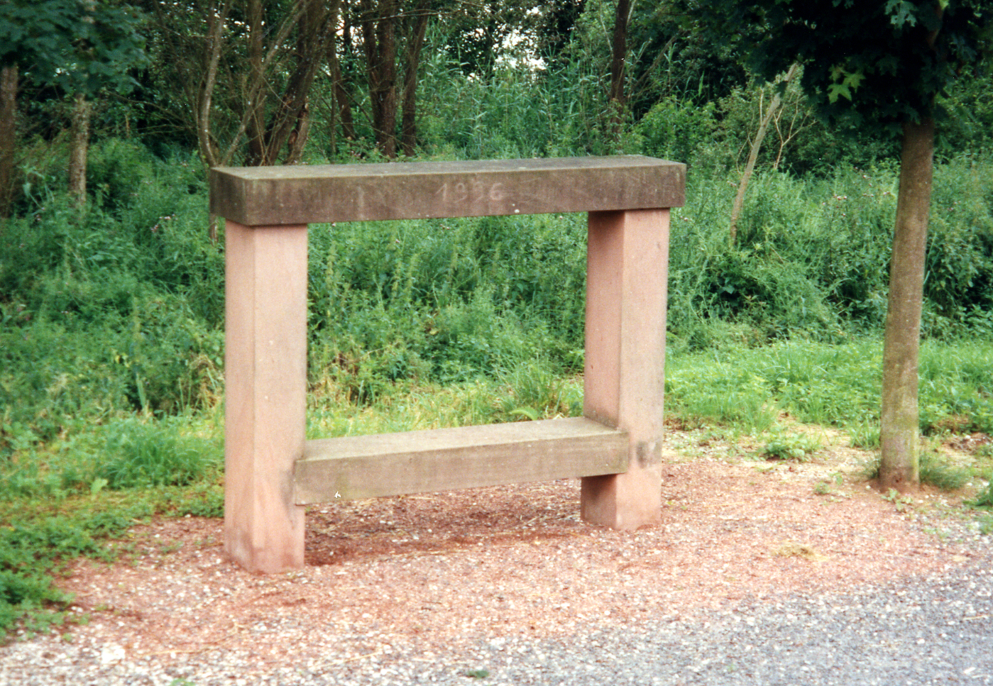 Nachbildung einer Napoleonsbank des 2. Empire im Jägerthal an der D 53 nördlich von Reichshoffen, an der Abzweigung nach Nehwiller